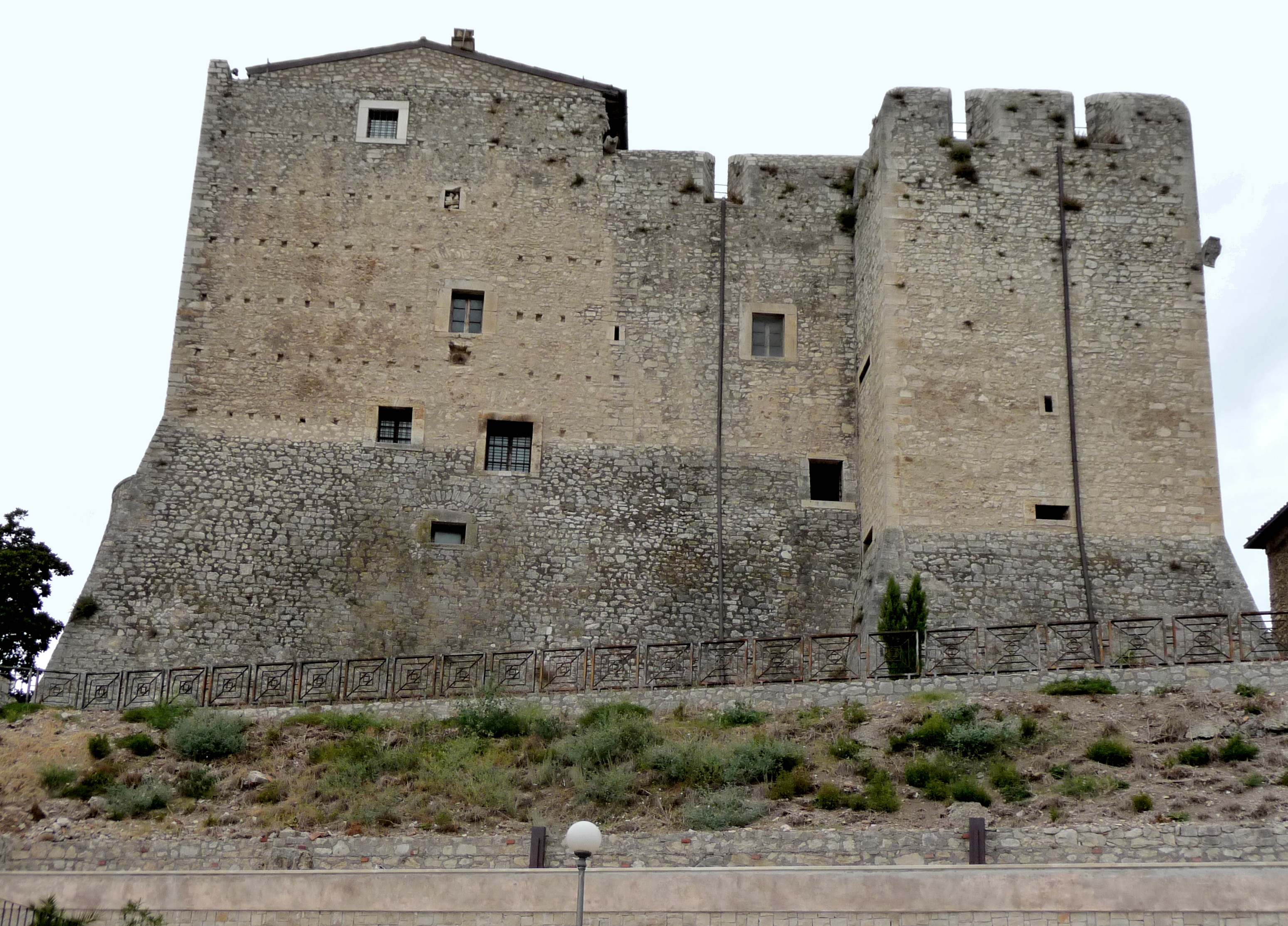 Rocca baronale